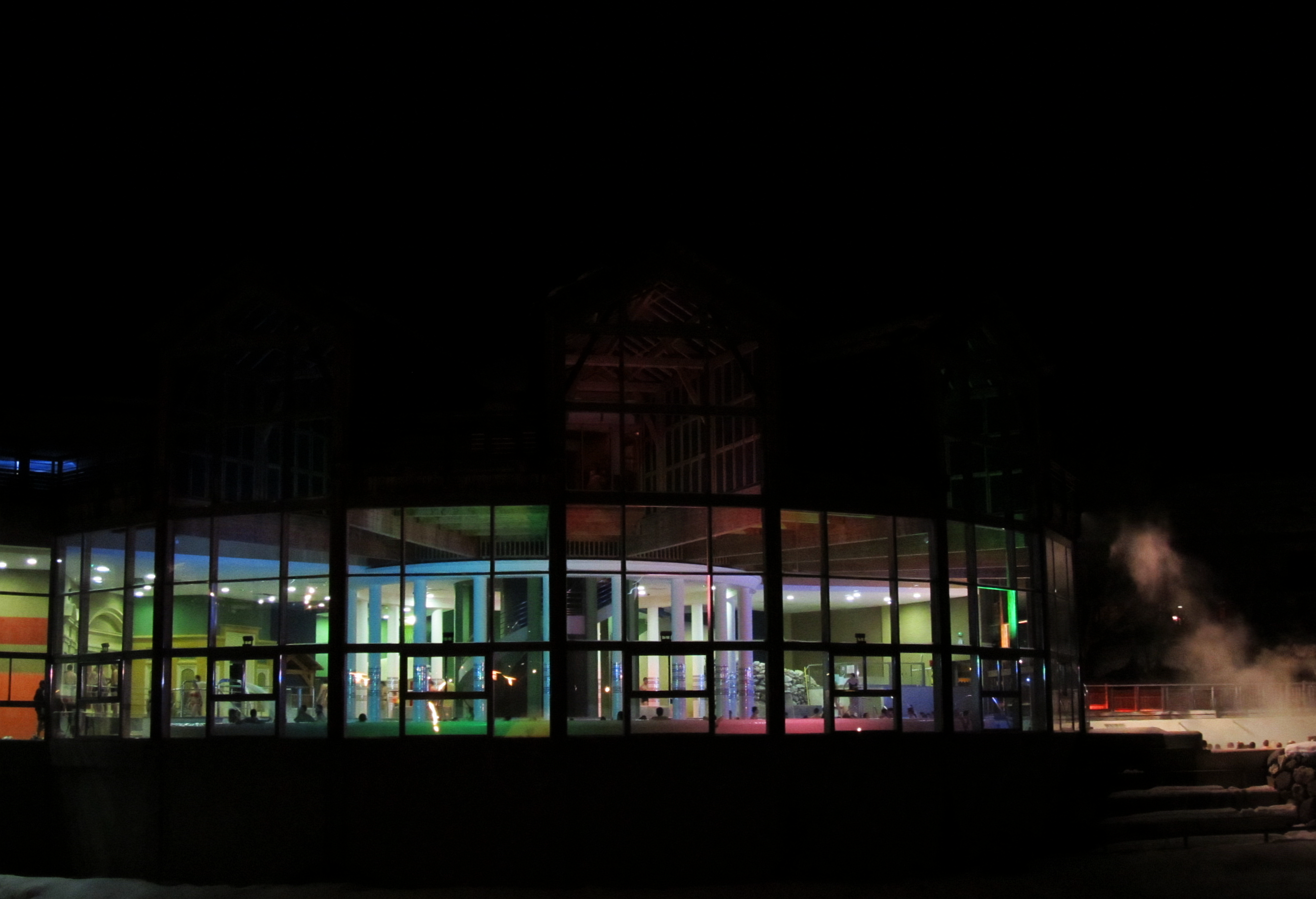 Les grands Bains du Monêtier (Hautes-Alpes)